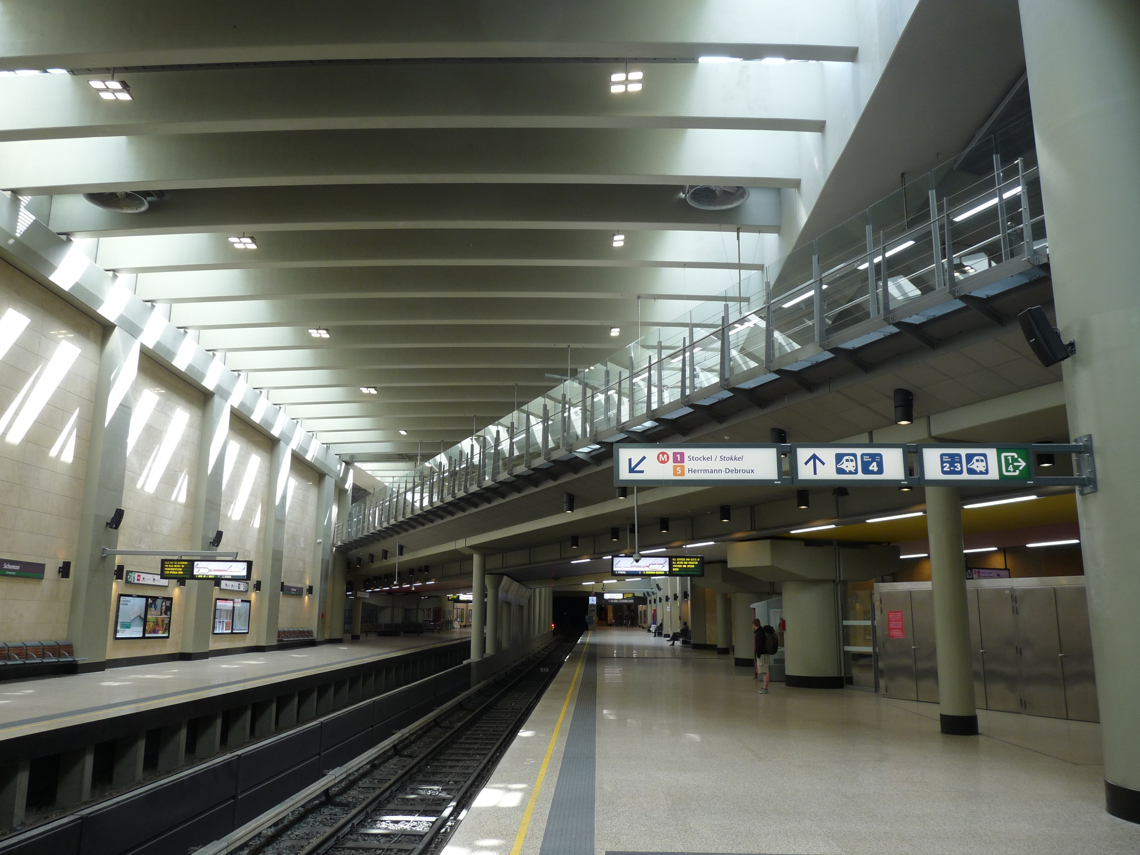 De spoordoorgang in het Schuman metrostation